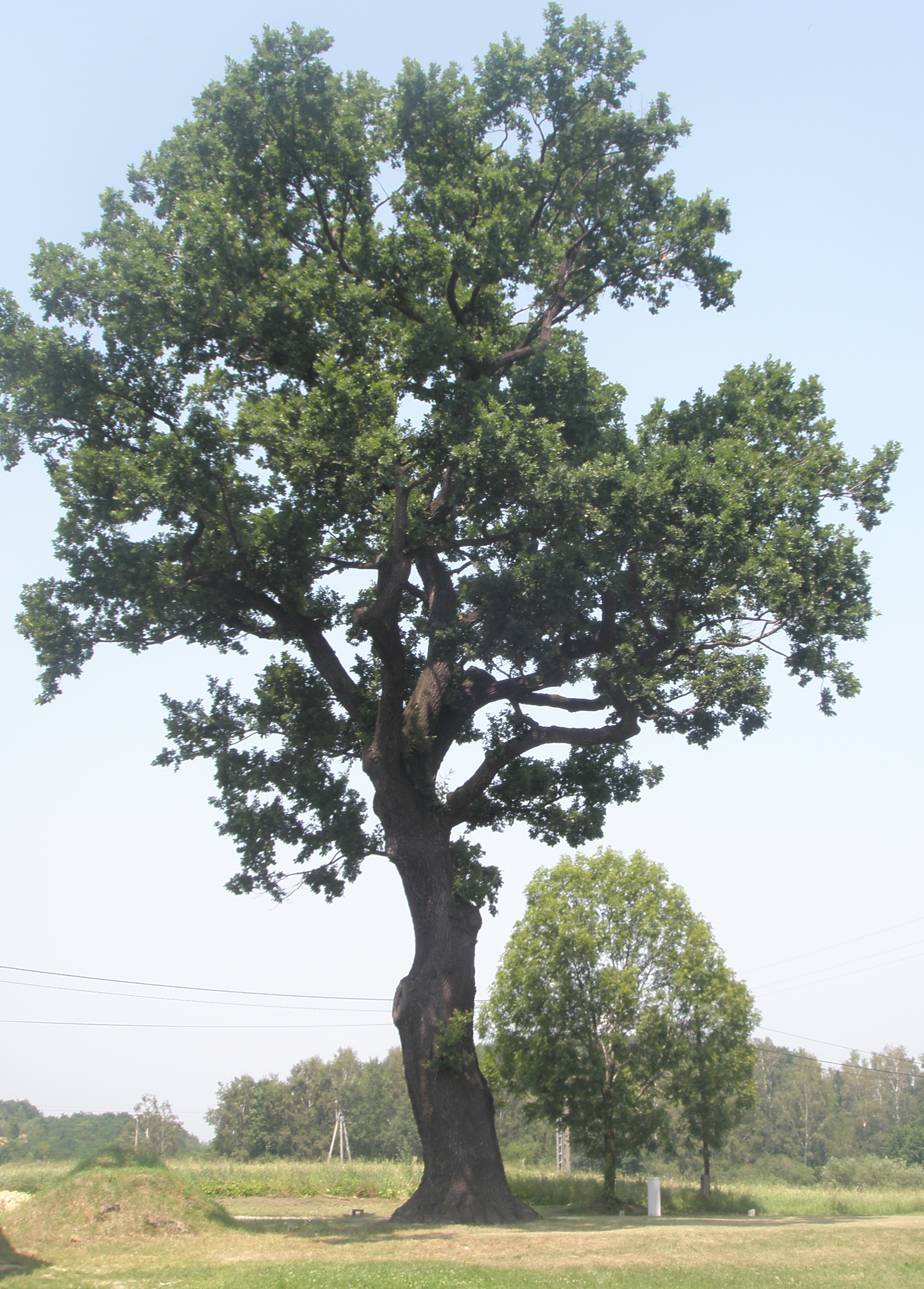 Dąb szypułkowy "Michał" - pomnik przyrody w Jankowicach Rybnickich w przysiółku Michałkowice